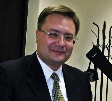 ETs